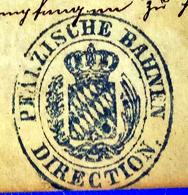 Stempel, Direktion Pfälzische Bahnen, 1874 (eigener Scan von eigenem altem Dokument)